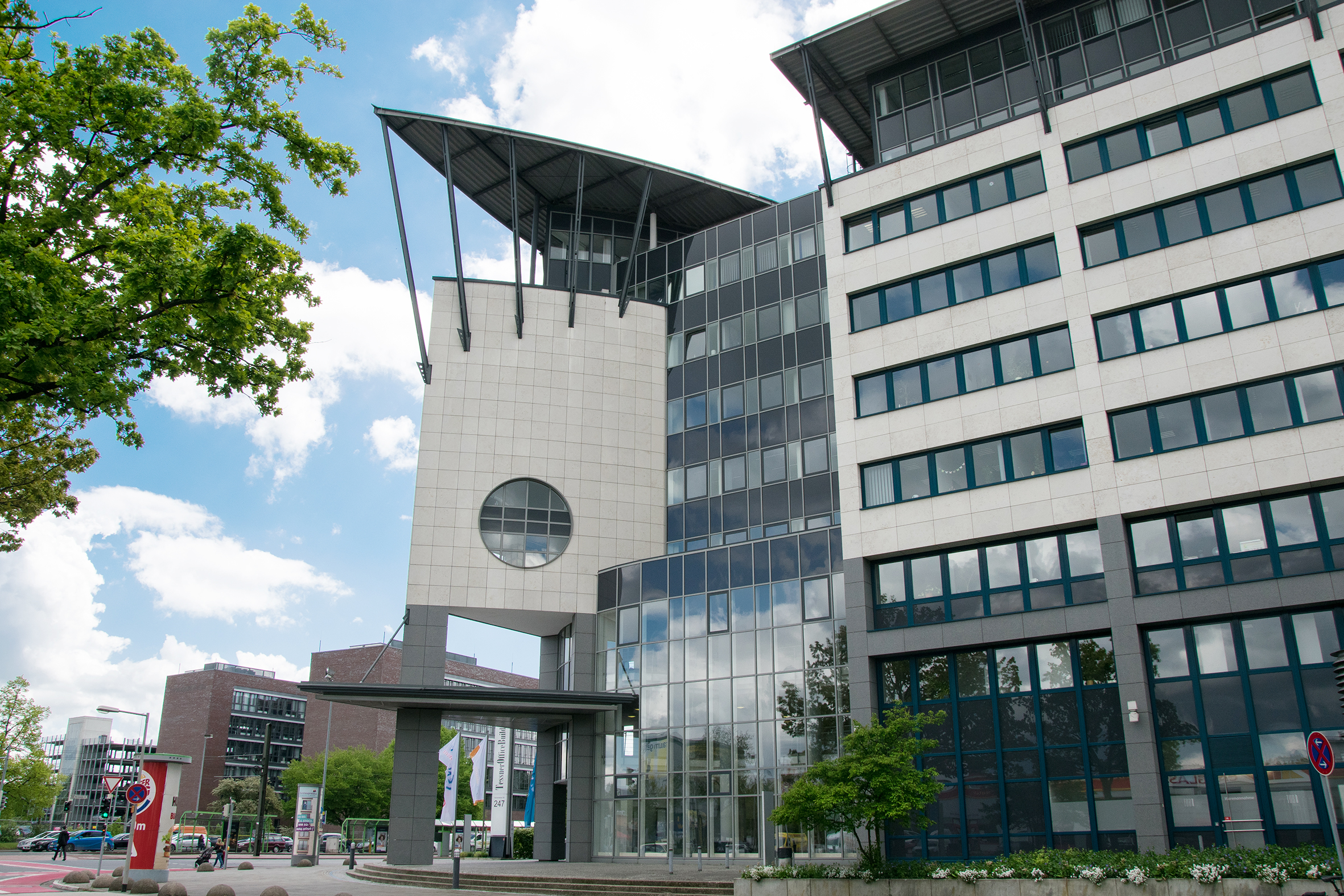 Sitz der Akademie in Hannover, Vahrenwalder Str. 247, 30179 Hannover, Bildquelle: ARL